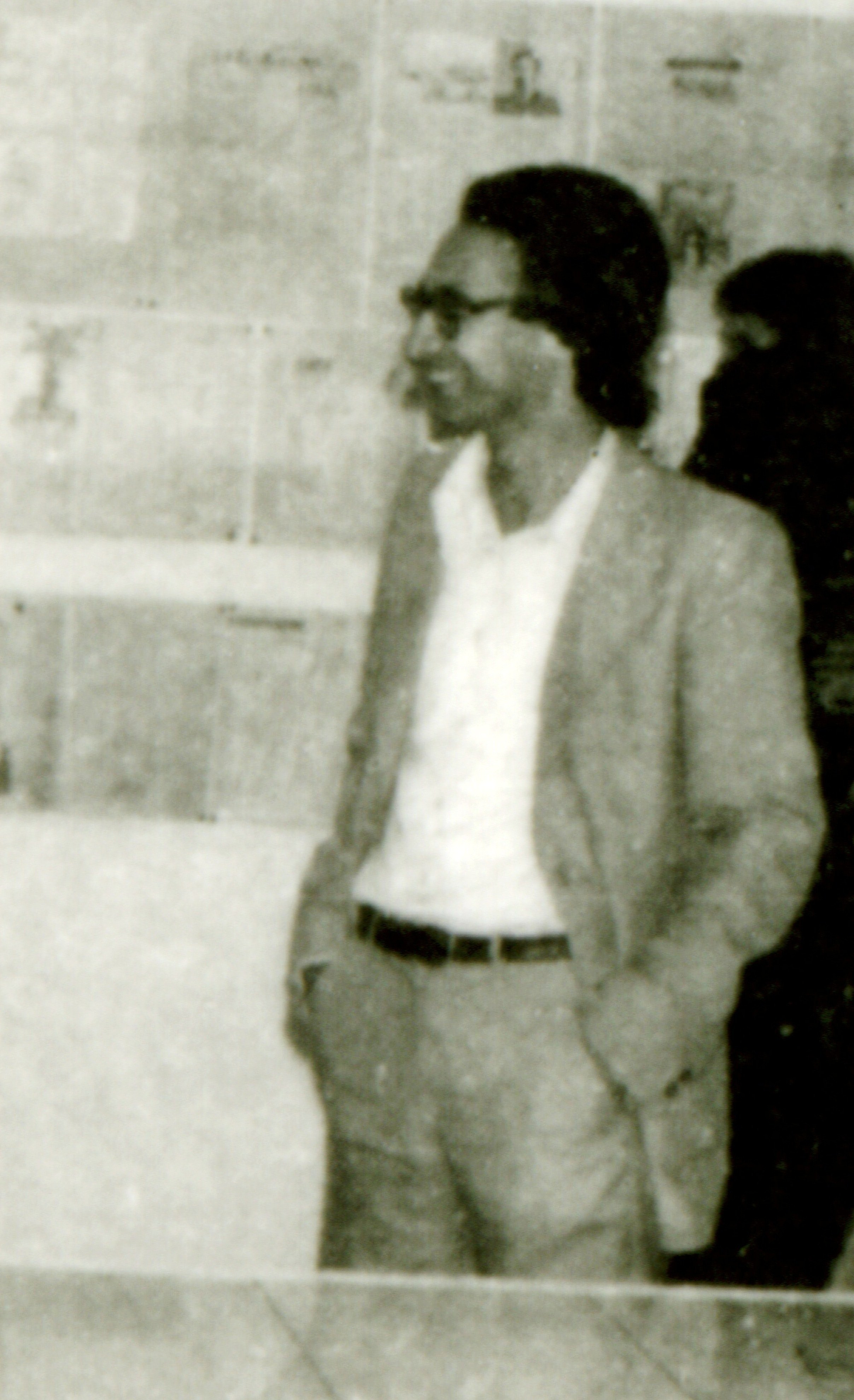 L'écrivain algérien Tahar Djaout (assassiné en 1993) lors d'un reportage en avril 1980.